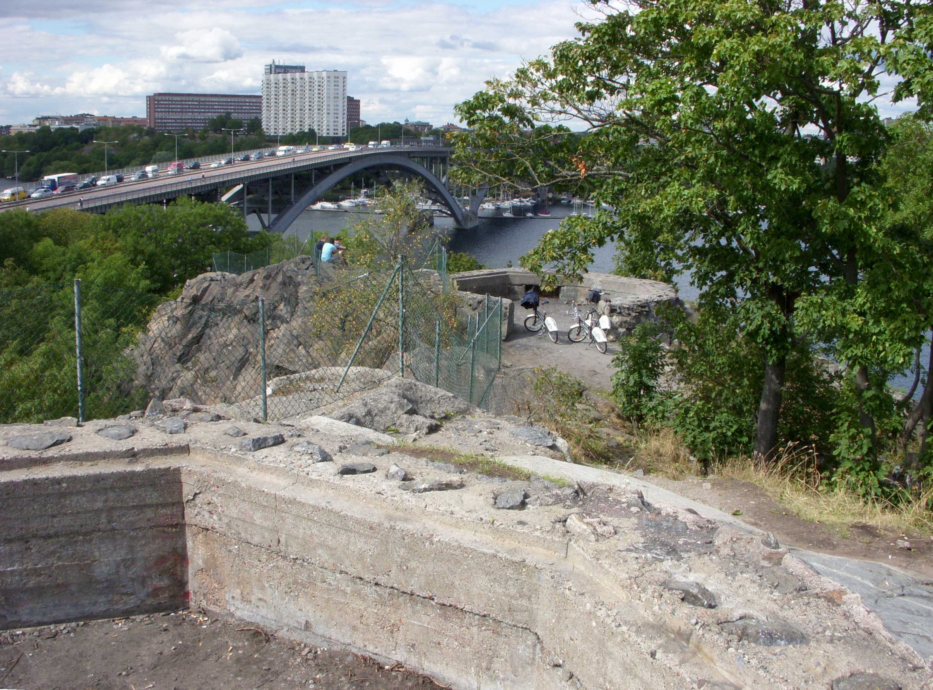 Långholmens luftvärnsbatteri med Västerdron i bakgrunden